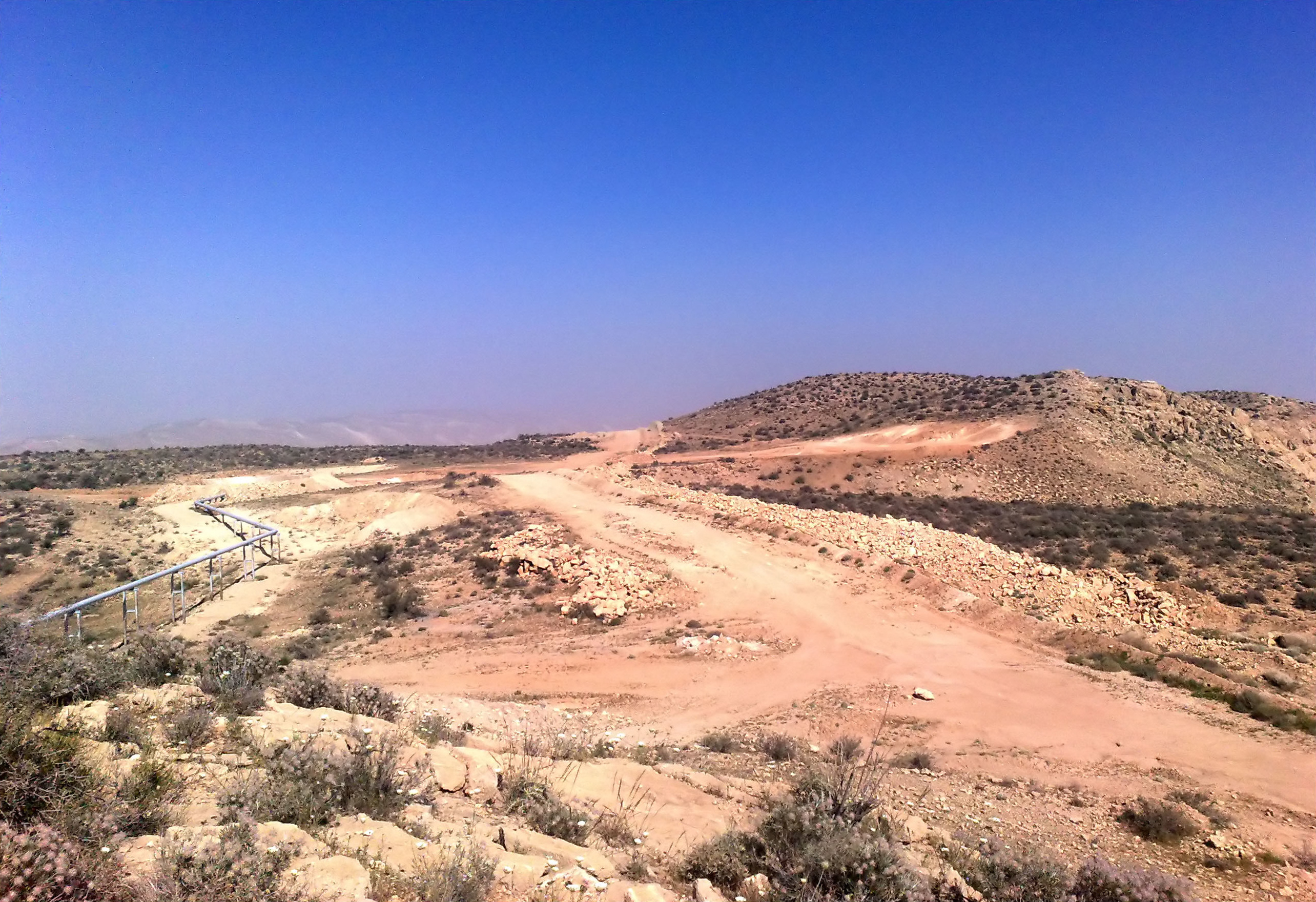 کوه تنگ خور، بخش علامرودشت استان فارس